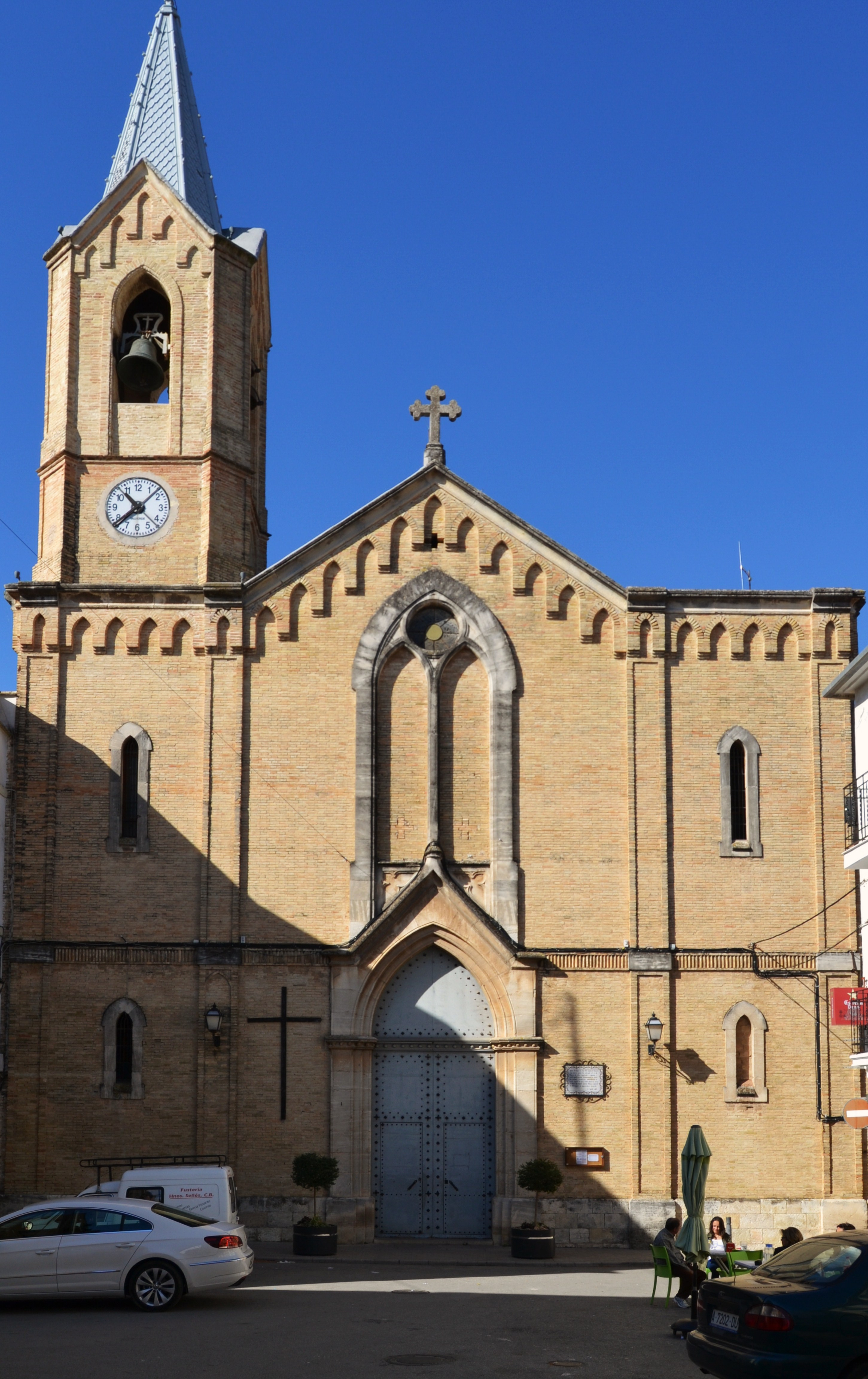 Església de Sant Pere Apòstol de Beniarrés 26.028-001.